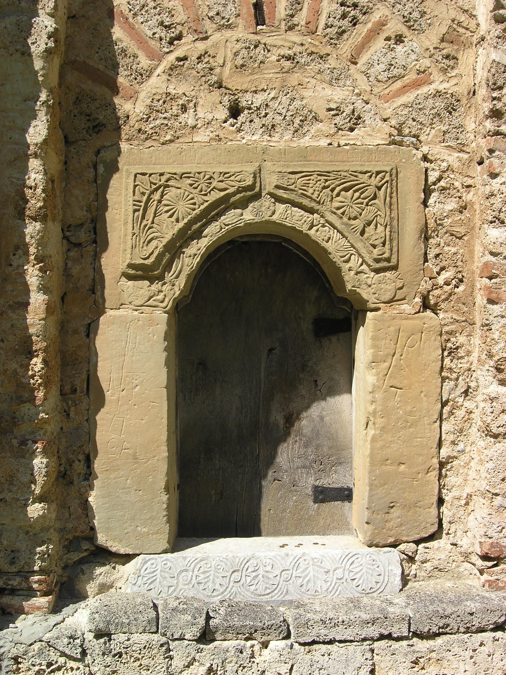 Eingang zum Diakonikon (Sakristei) der Johannes-Kirche, Kloster Zemen, Bulgarien